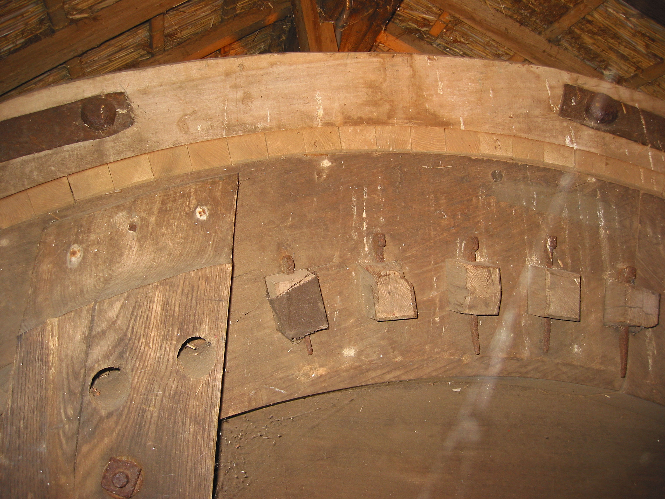 Walderveense molen detail achterzijde bovenwiel met vang